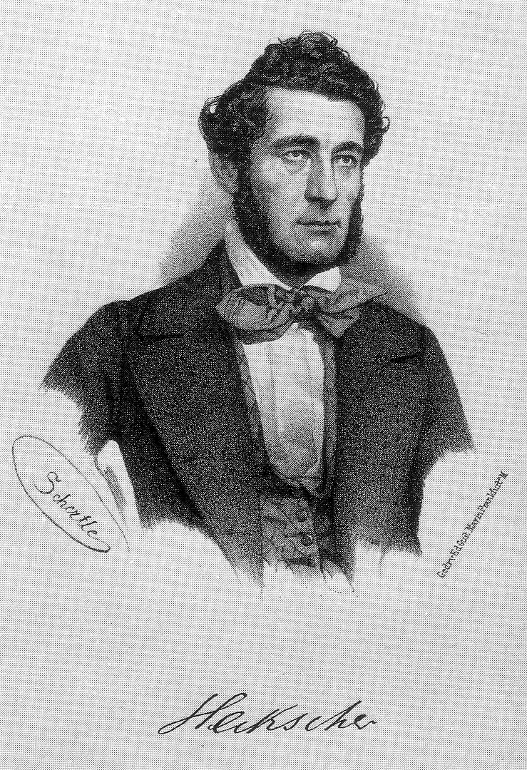 Johann Gustav Heckscher (1797-1865), Abgeordneter der Paulskirche